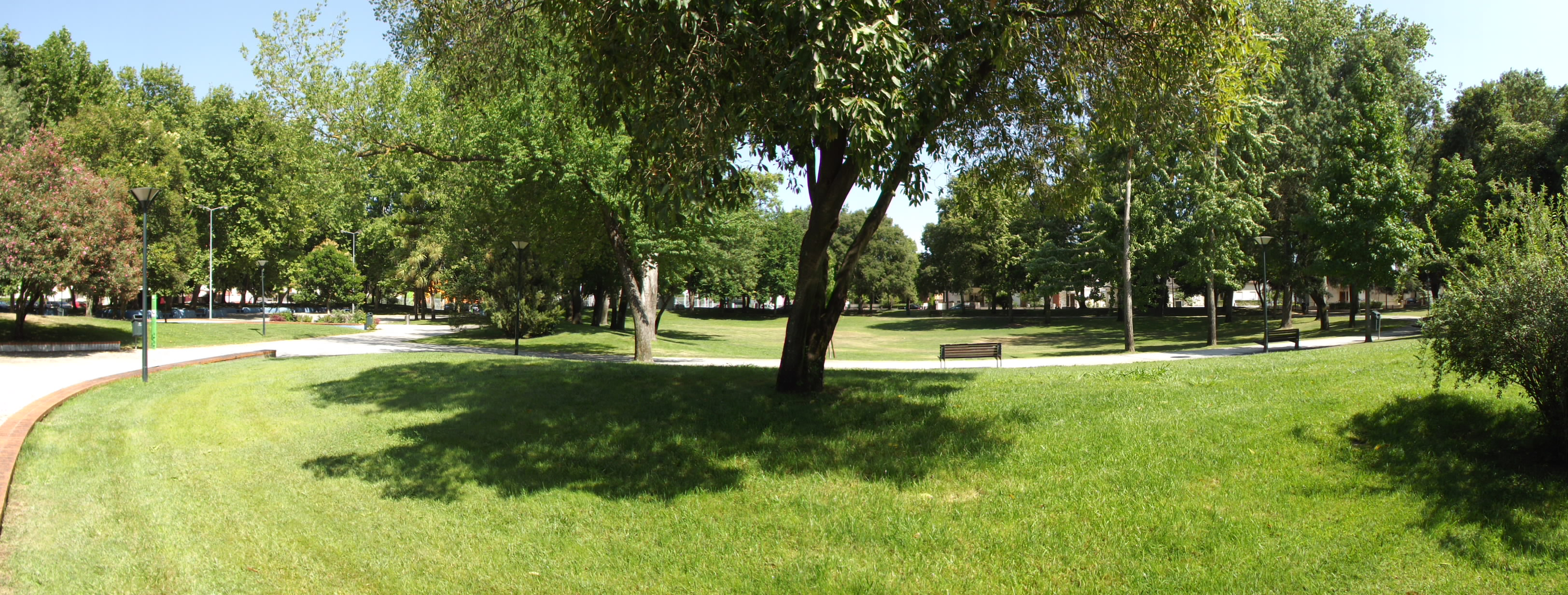 Jardim Serrão Lopes (conhecido pelos locais como "Zona Verde")